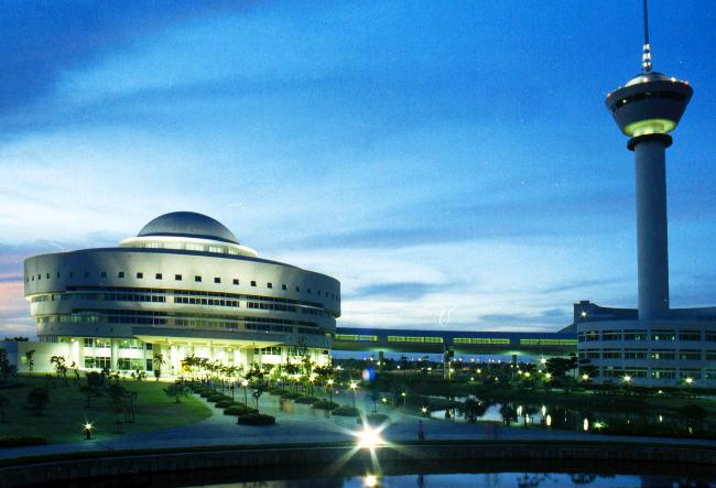 shinU